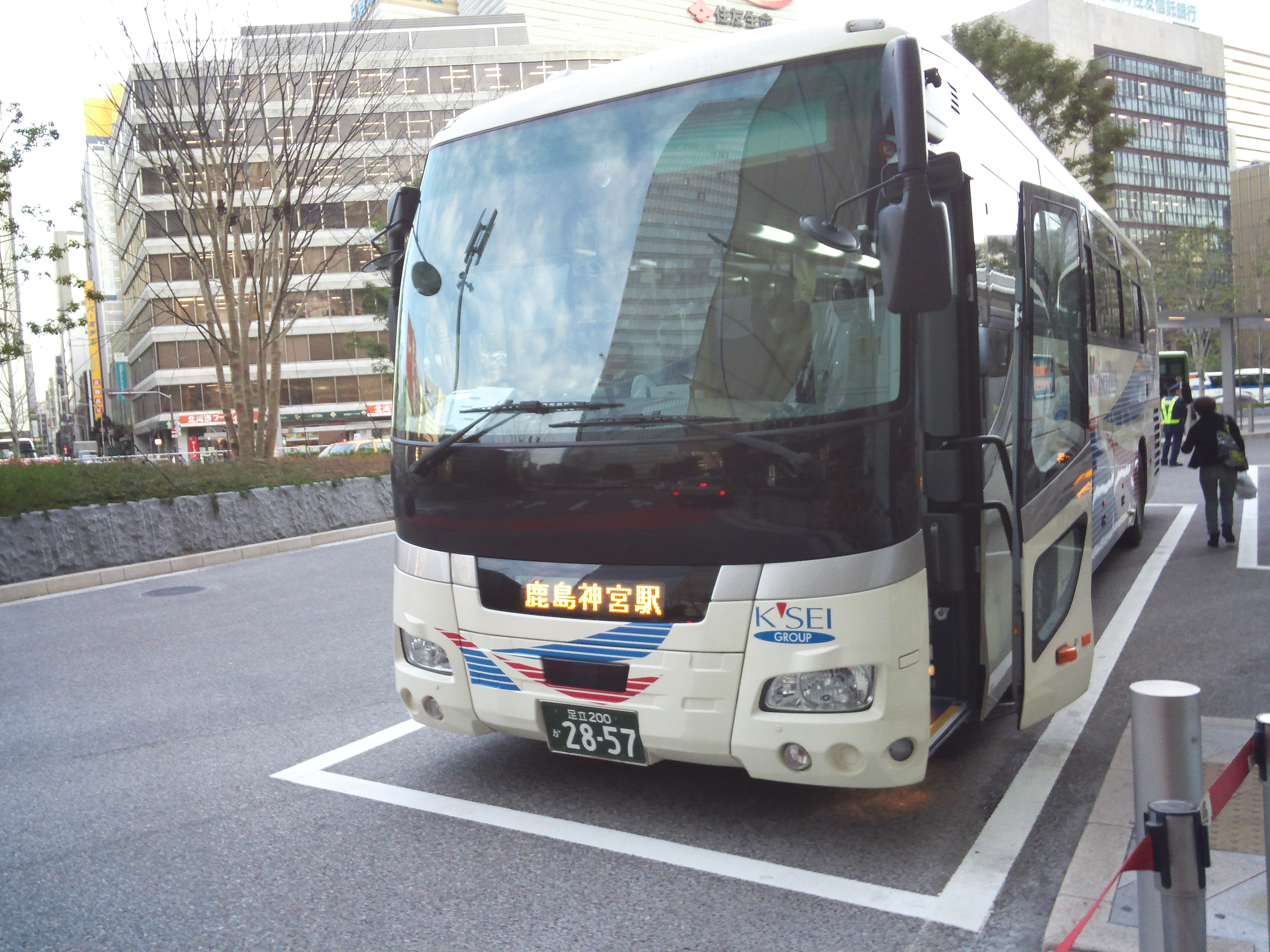 京成グループ共通塗装車で運用されているかしま号。（東京駅八重洲南口にて撮影）